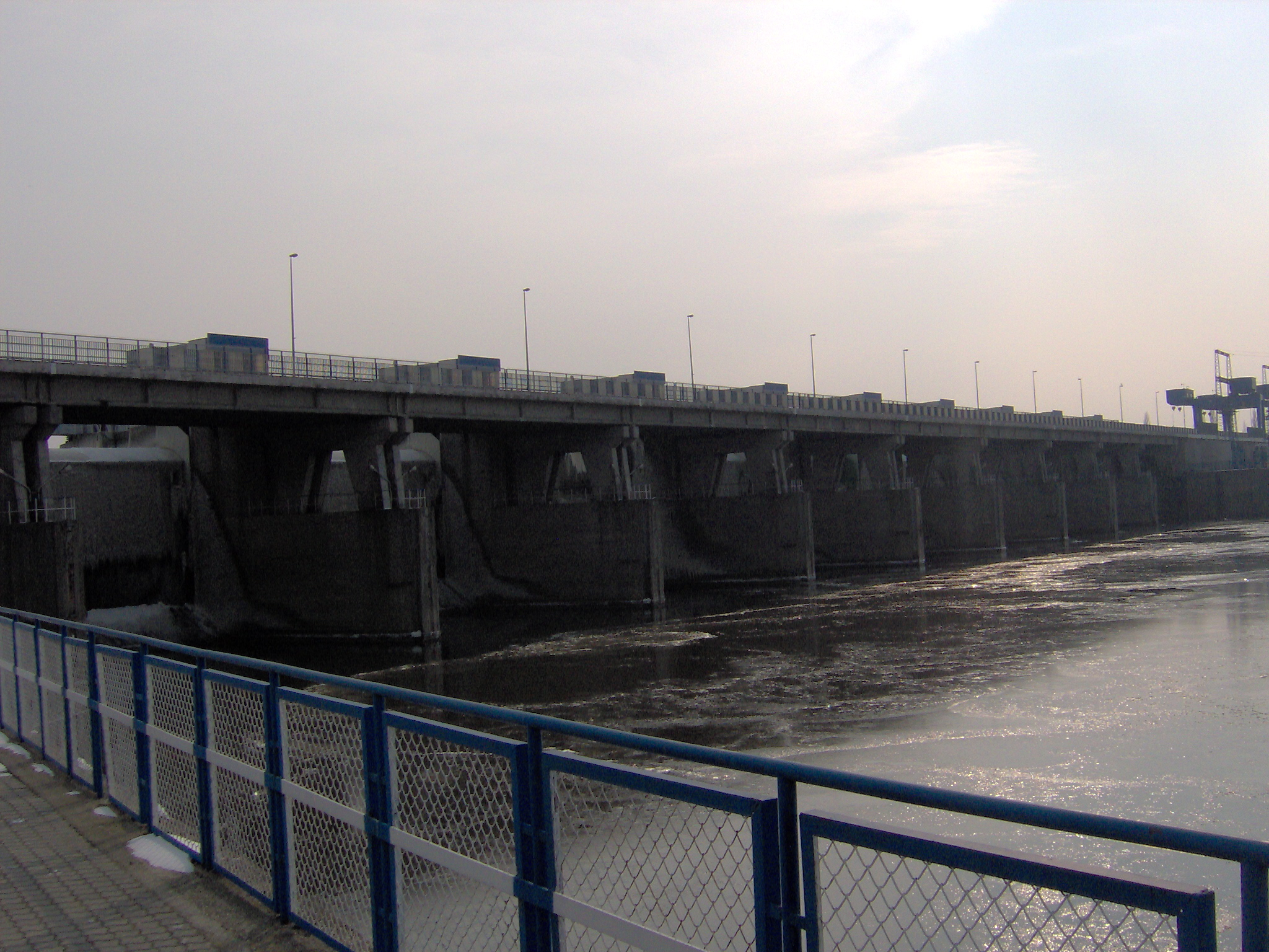 Zapora wodna na Wiśle i okolice (2007 r.)